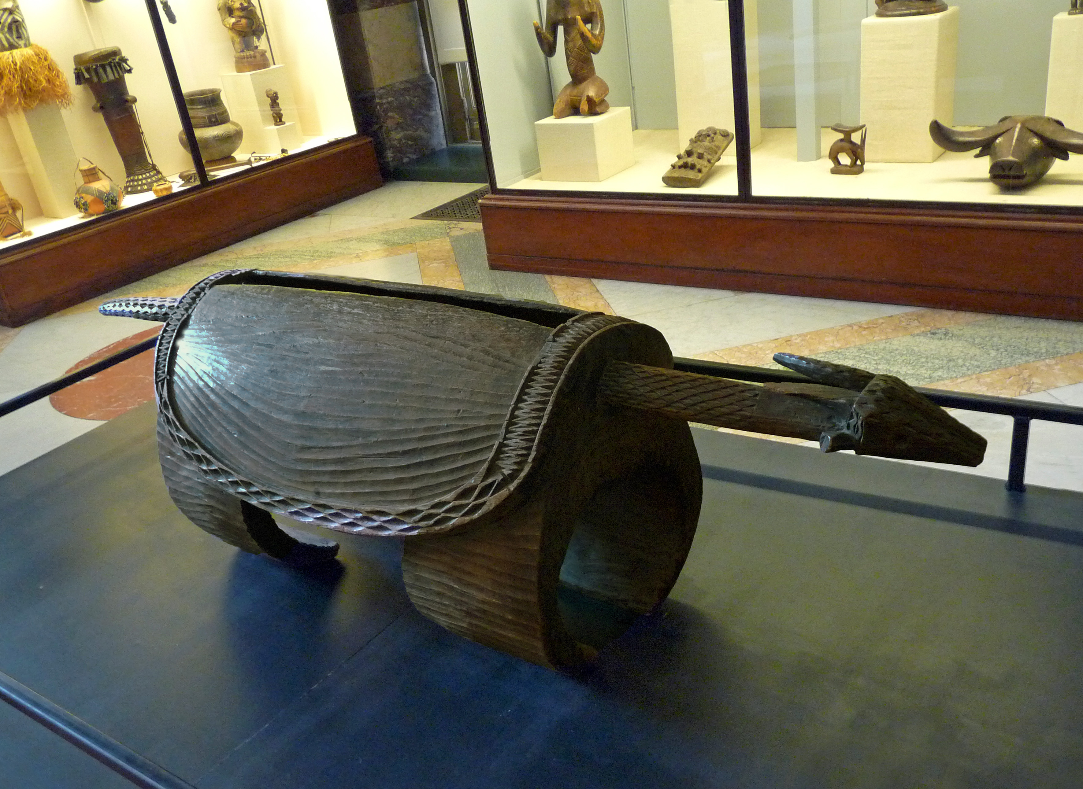 Loï : grand tambour à fente zoomorphe, présenté à Tervuren dans le cadre de la section coloniale de l'Exposition universelle de 1897 à Bruxelles. Musée royal de l'Afrique centrale